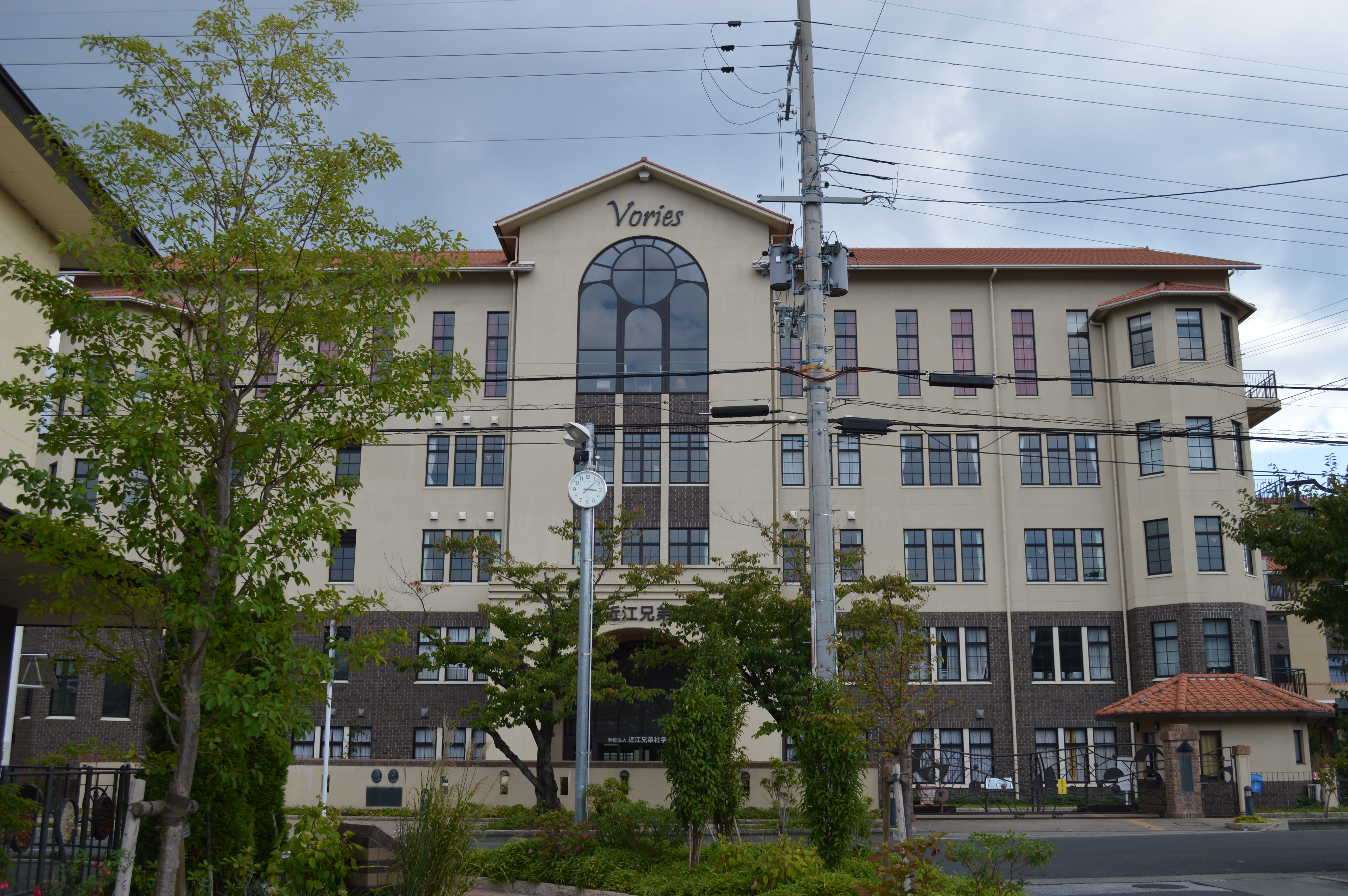 滋賀県近江八幡市の近江兄弟社学園